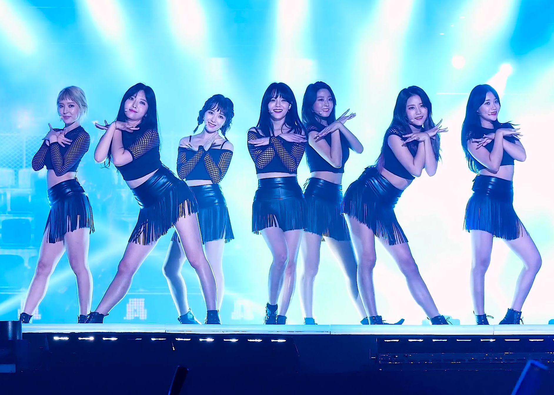 2016년 9월 24일 인천 한류 관광 콘서트에서 심쿵해를 공연하는 AOA.